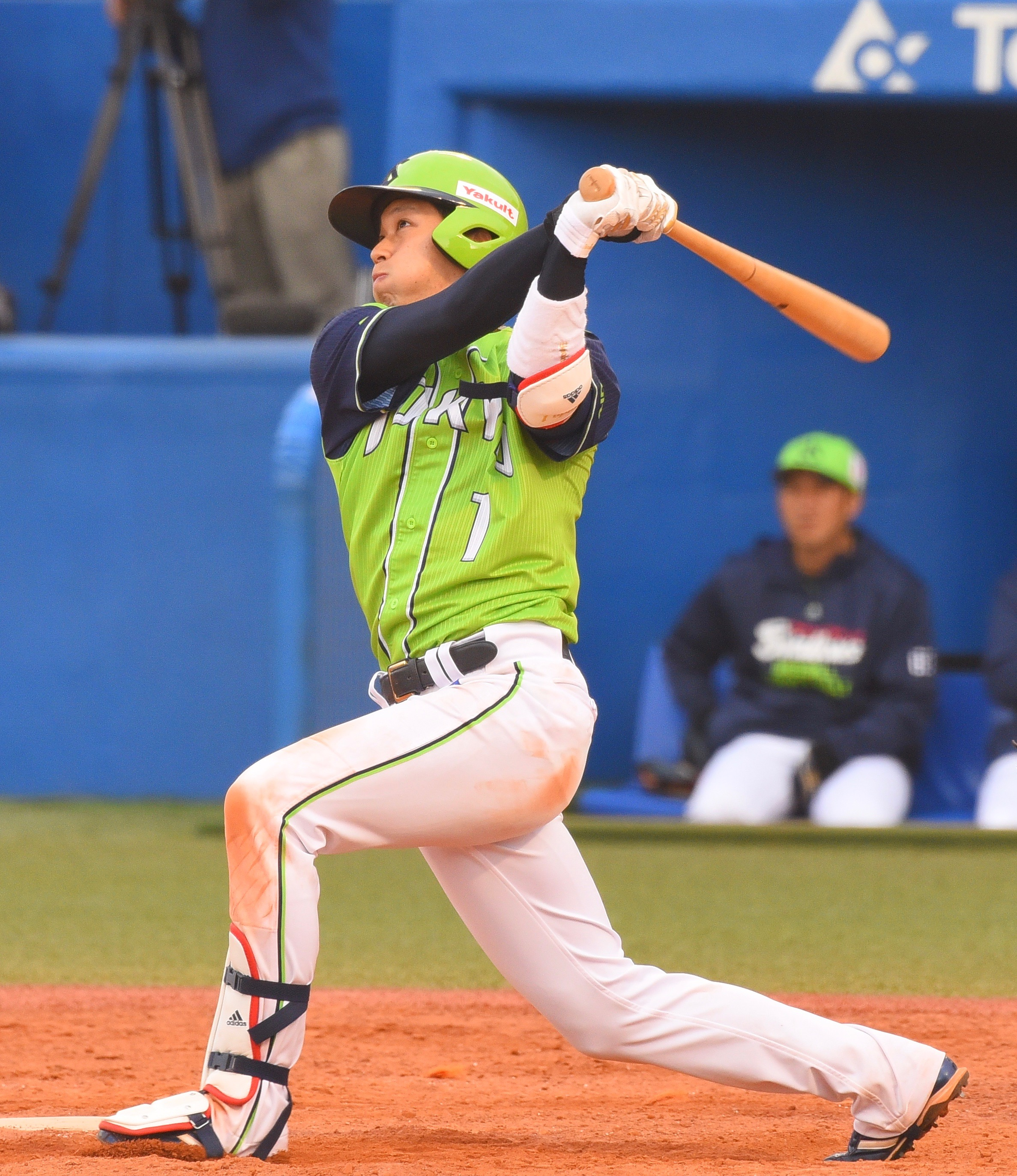 東京ヤクルトスワローズ 山田哲人 2018年4月7日 神宮球場